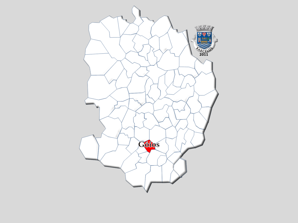 Censos 1964/2011